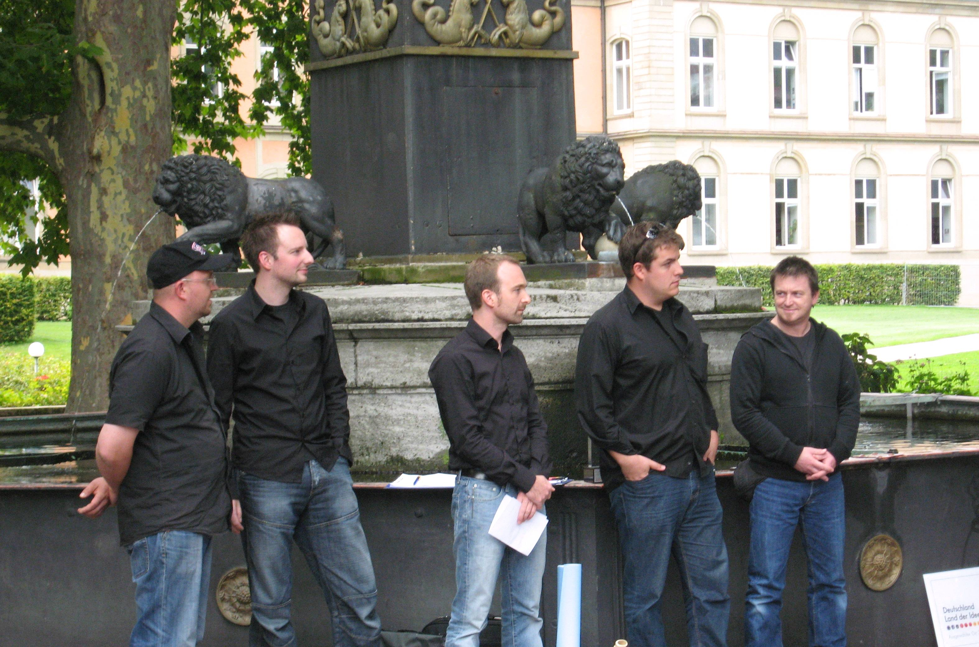 Die a-cappella Gruppe Füenf in Stuttgart - Preisverleihung "Land der Ideen"